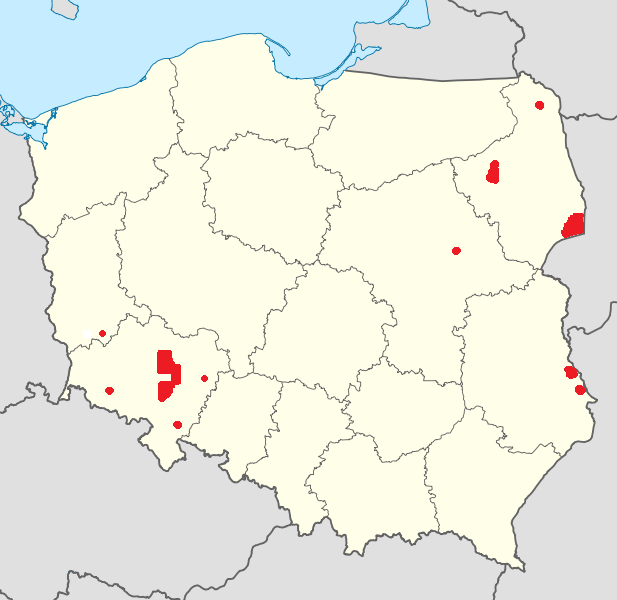 Przybliżony zasięg występowania przeplatki maturny (Euphydryas maturna) w Polsce w 2010 r. na podstawie: Jarosław Buszko. Euphydryas maturna (Linnaeus, 1758) Przeplatka maturna Scarce Fritillary w: (red.) Zbigniew Głowaciński, Janusz Nowacki. Polska Czerwona Księga Zwierząt -Bezkręgowce. „PAN, AR”, 2004 oraz informacji zawartych na stronie (dostęp 16.II.2012).